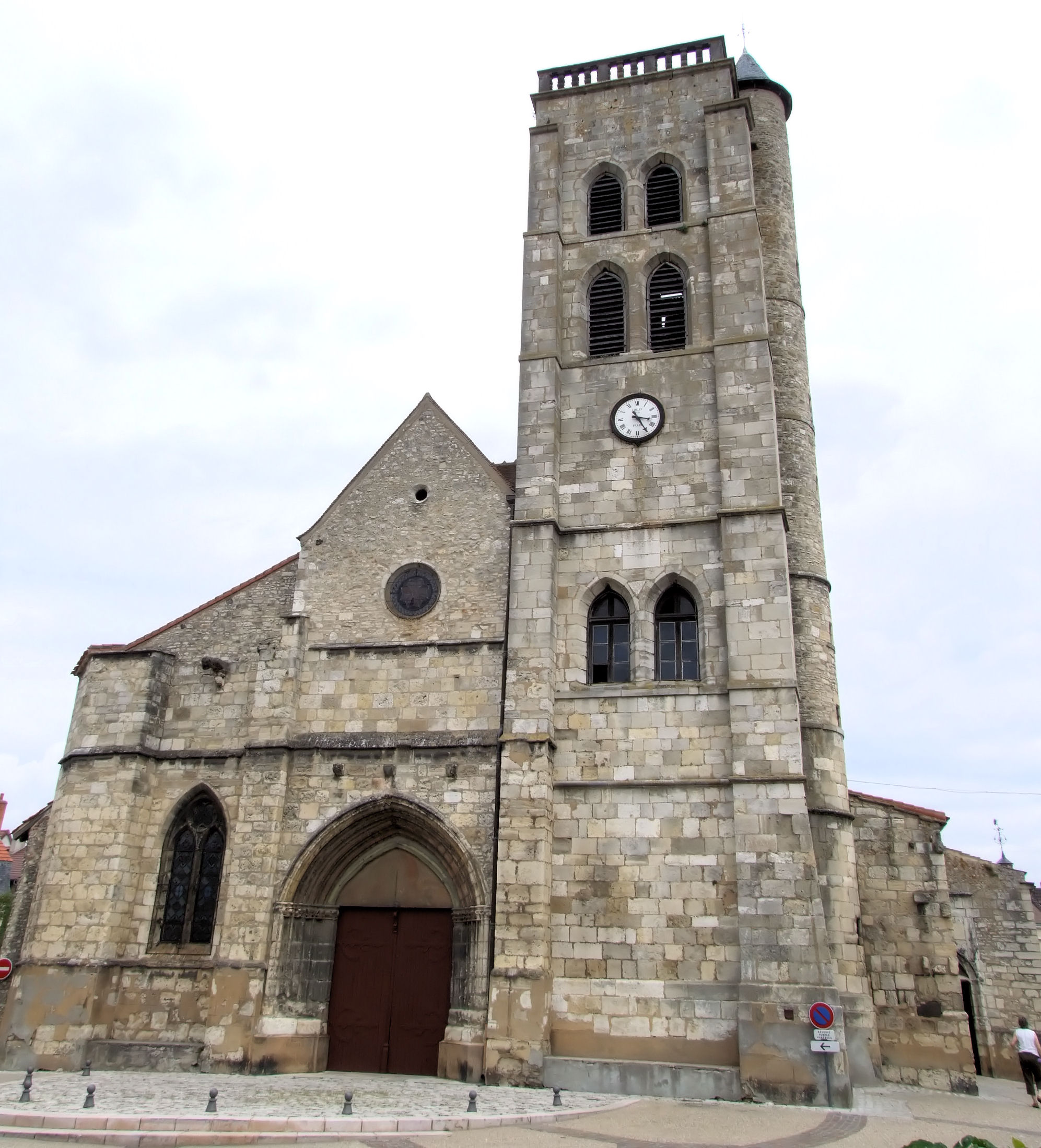 Gannat - Église Sainte-Croix - Façade et clocher